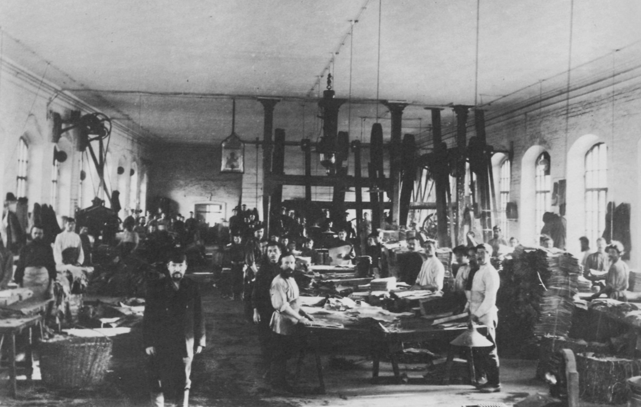 Russischer Photograph: Arbeitsvorgänge bei der Behandlung von Leder und Filz [1]